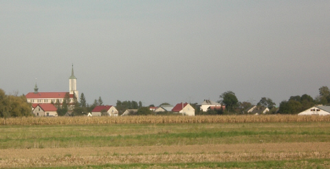 Vue générale de Biskupice Radlowskie Pologne